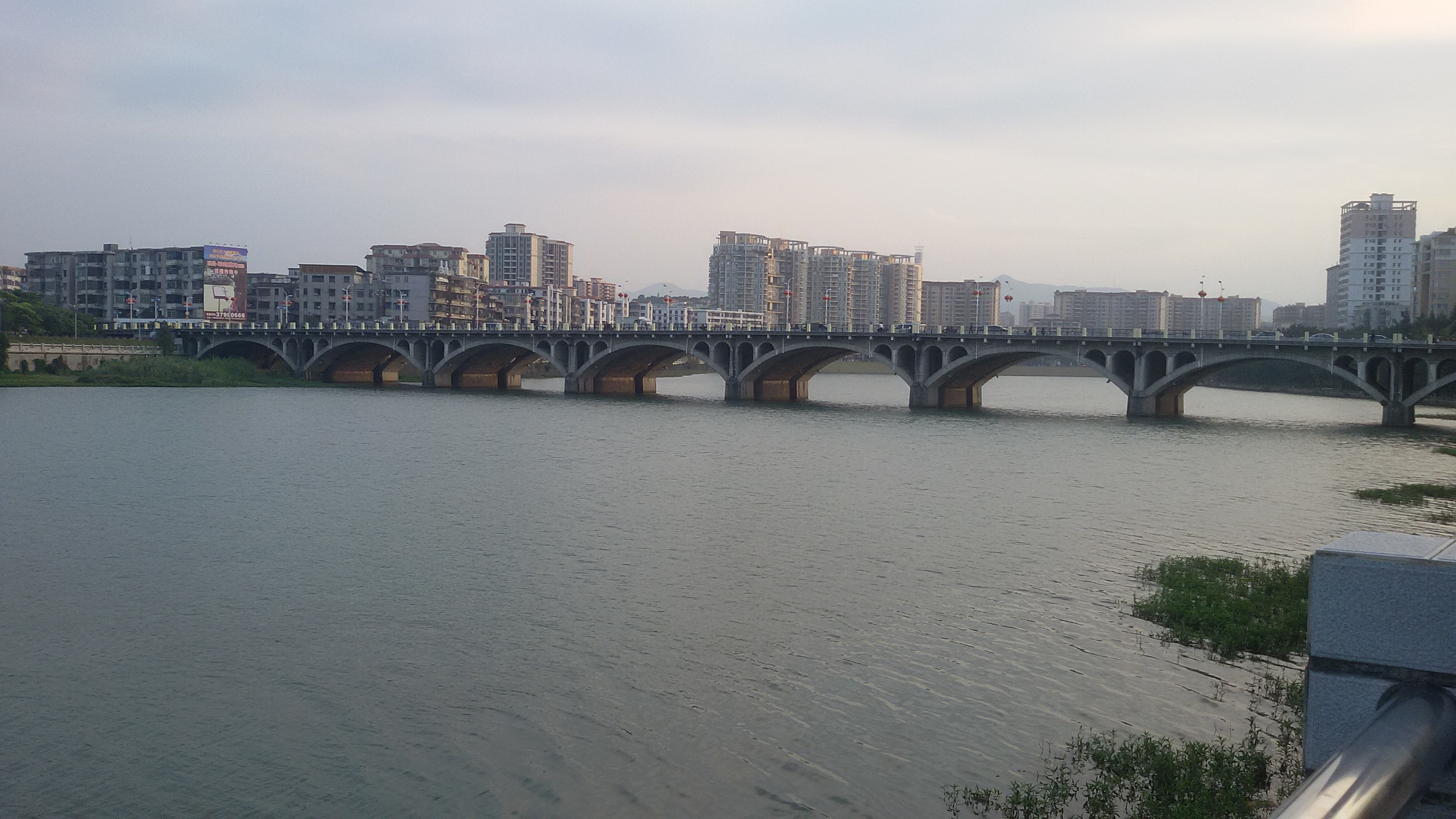 粵語: 從化街口大橋